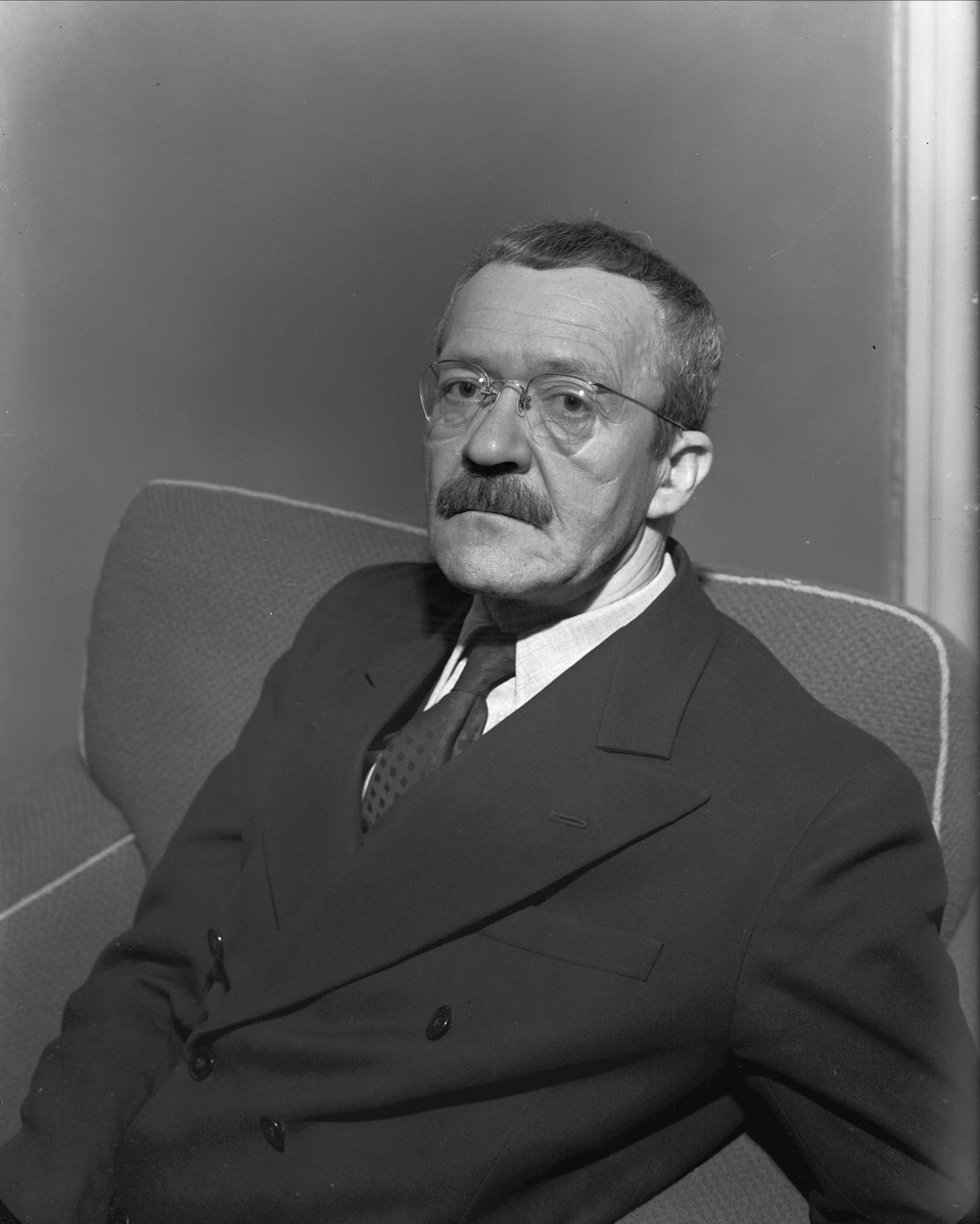 Arnulf Øverland. Foto: Leif Ørnelund, 14. februar 1949. Fra Byhistorisk samling hos Oslo Museum.